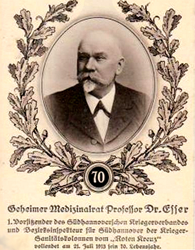 Der Arzt, Tierarzt (Veterinär) und Geheime Medizinalrat Jacob Hubert Esser, hier mit einem Porträt im Lorbeerkranz auf einer Ansichtskarte (Ausschnitt) mit der Ankündigung seines 70. Geburtstages am 21. Juli 1913. Im selben Jahr war er laut der Bilduntertitelung „1. Vorsitzender des Südhannoverschen Kriegerverbandes und Bezirksinspektor für Südhannover der Krieger- Sanitätskolonnen vom „Roten Kreuz“ vollendet am 21. Juli 1913 sein 70. Lebensjahr“ ...